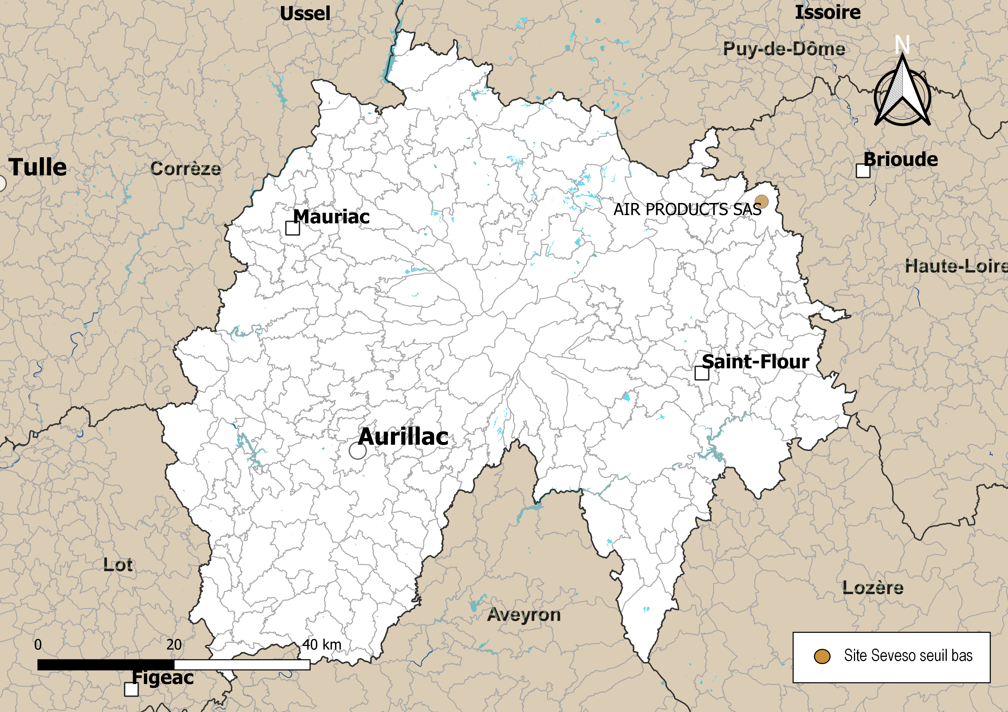 Carte de localisation des sites Seveso seuil bas dans le département du Cantal (Auvergne-Rhône-Alpes, France). Carte arrêtée au 3 novembre 2019.